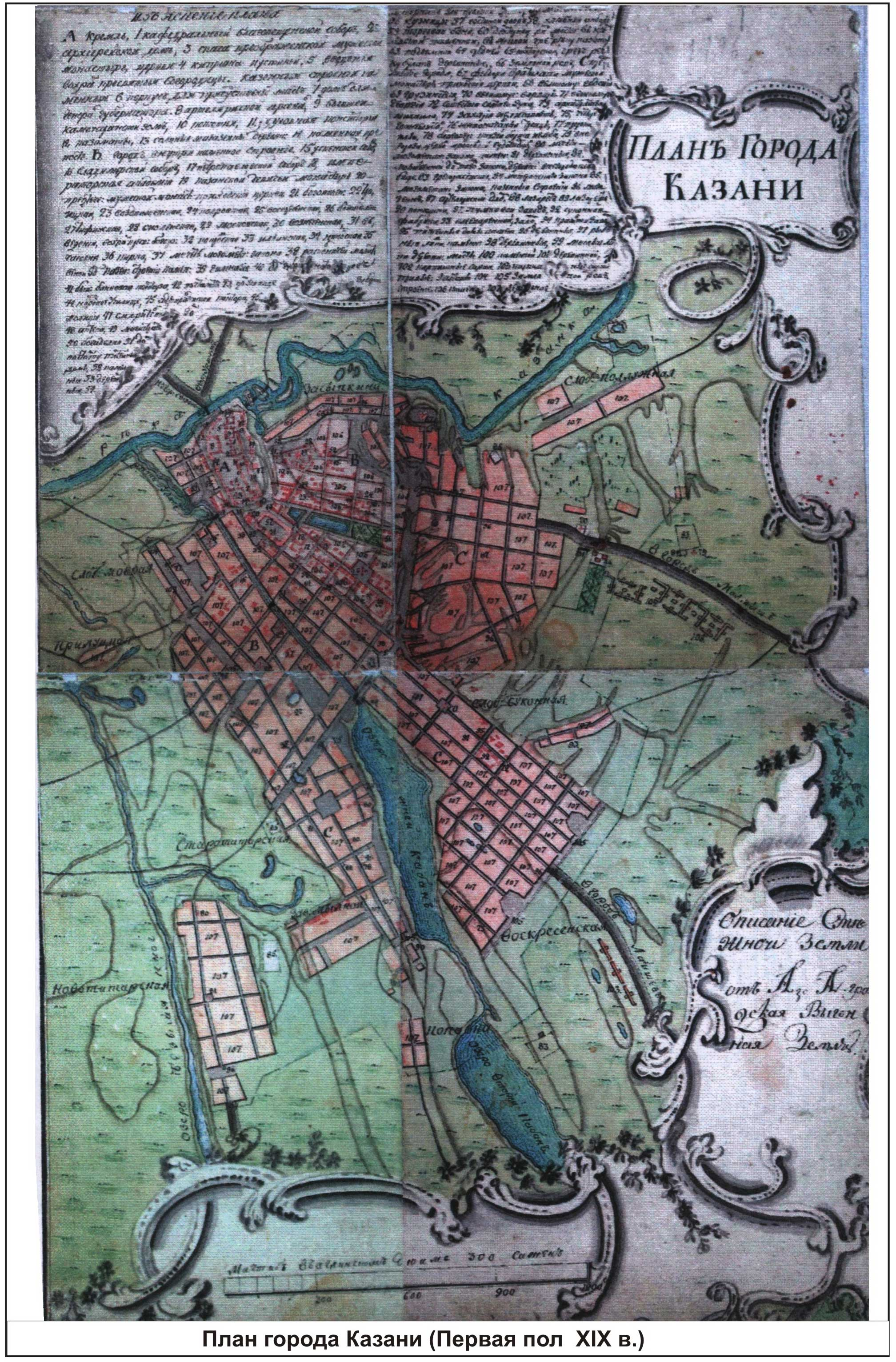 Генеральный план Казани. Первая половина XIX века.